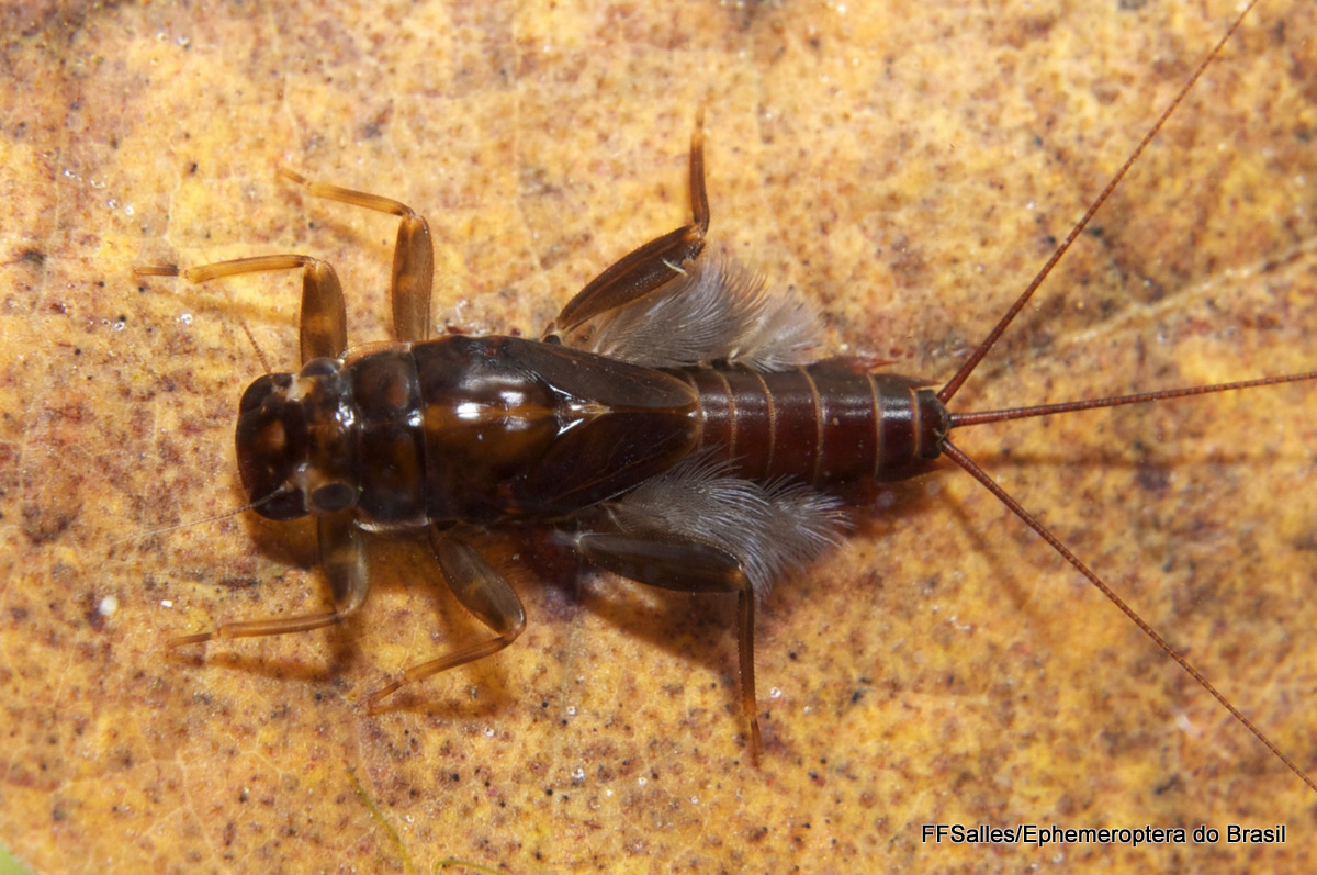 ephemeroptera ninfa